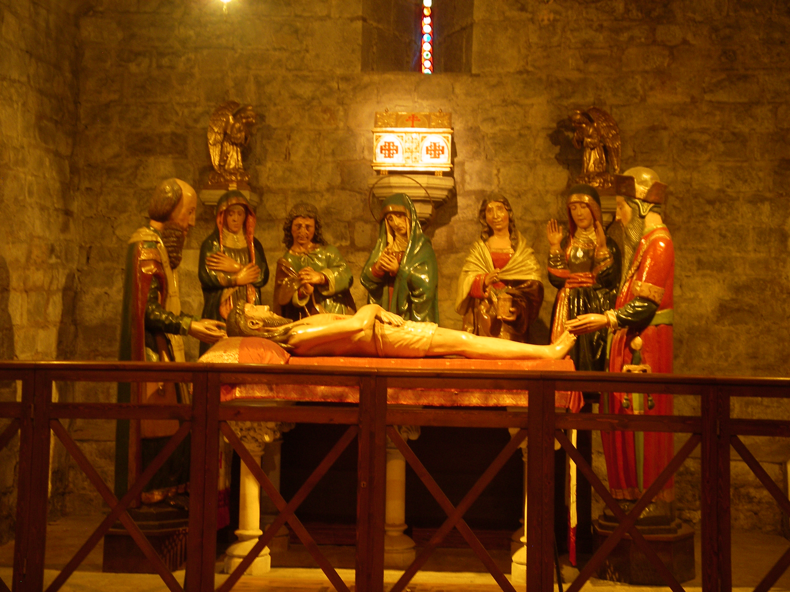 Grup del s. XV, anònim, amb el Sant Enterrament, a la Col·legiata de Santa Anna de Barcelona